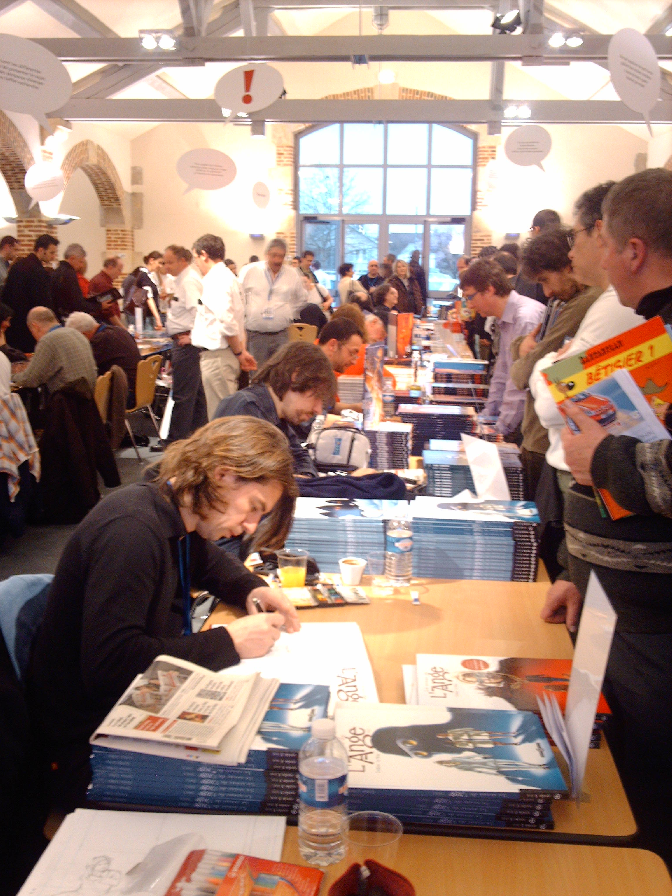 8ème édition du Festi BD de Moulins dans l'Espace Villars du Centre national du costume de scène.